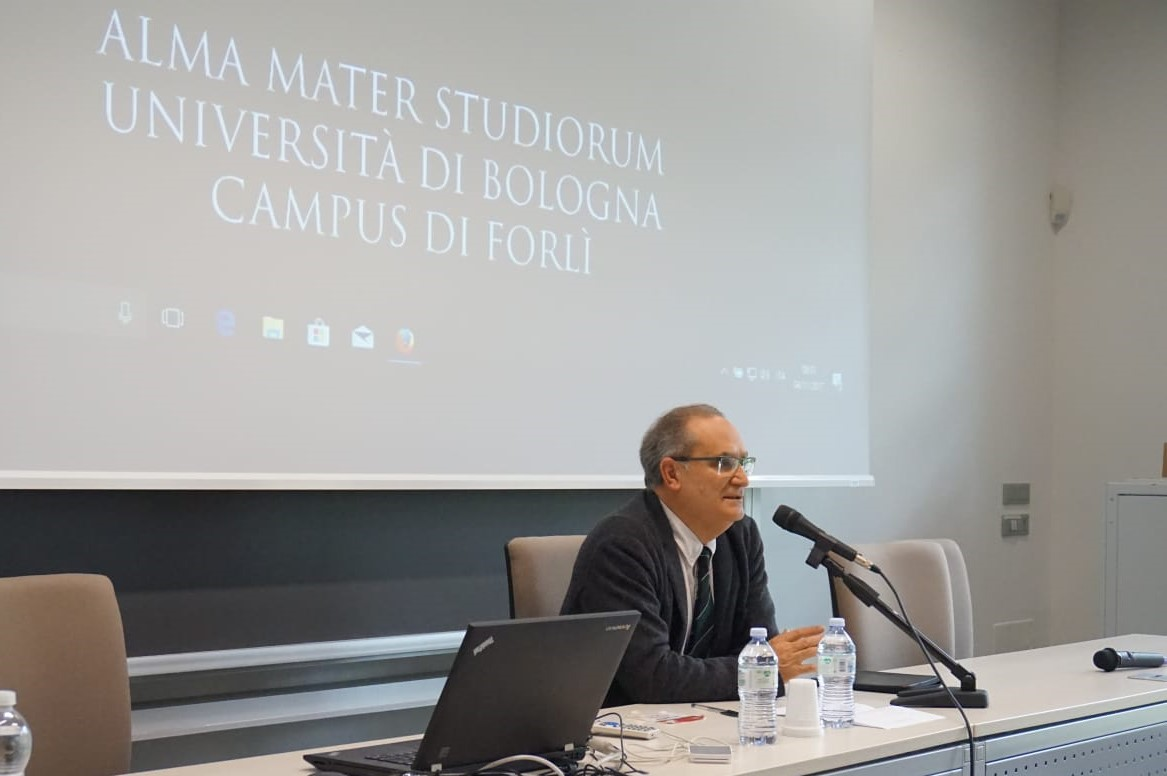 El profesor de la Universidad de Bolonia, Félix San Vicente.